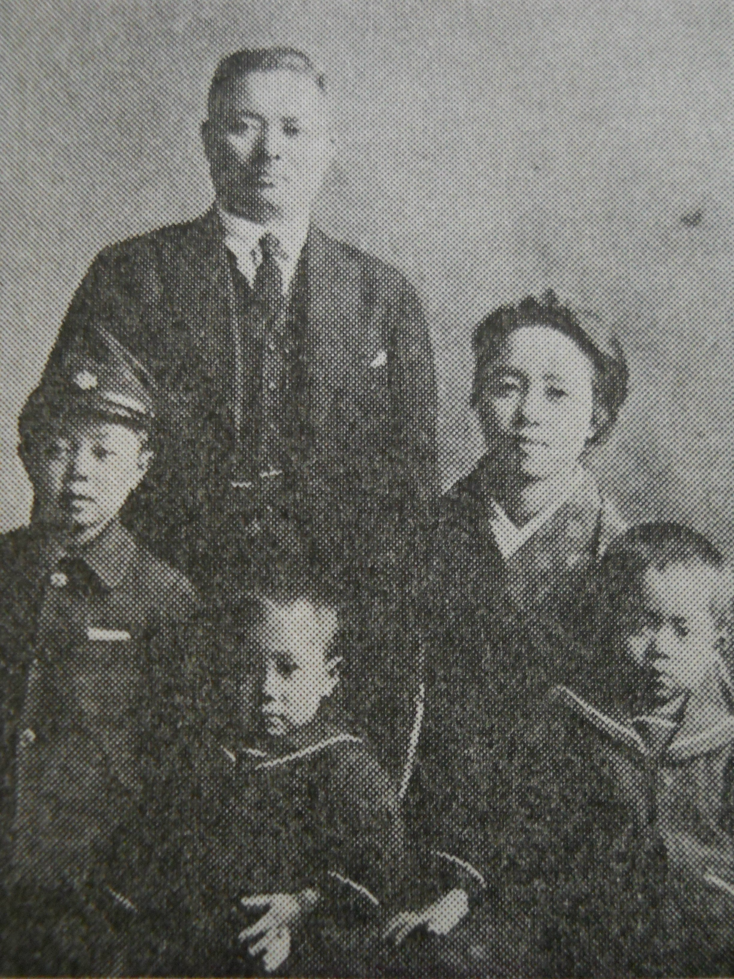 Ｍｉｙａｚａｗａ Ｆａｍｉｌｙ